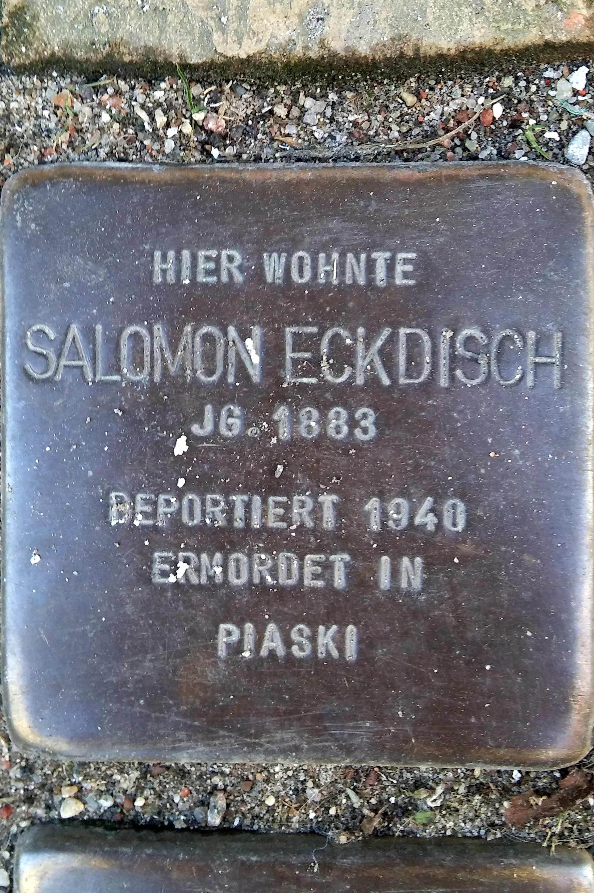 Stralsund, Frankenstraße 11, Stolperstein Salomon Eckdisch